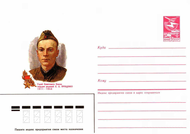 Конверт с маркой СССР. Герой Советского Союза Проценко Леонид Алексевич (портрет). 1911-1943